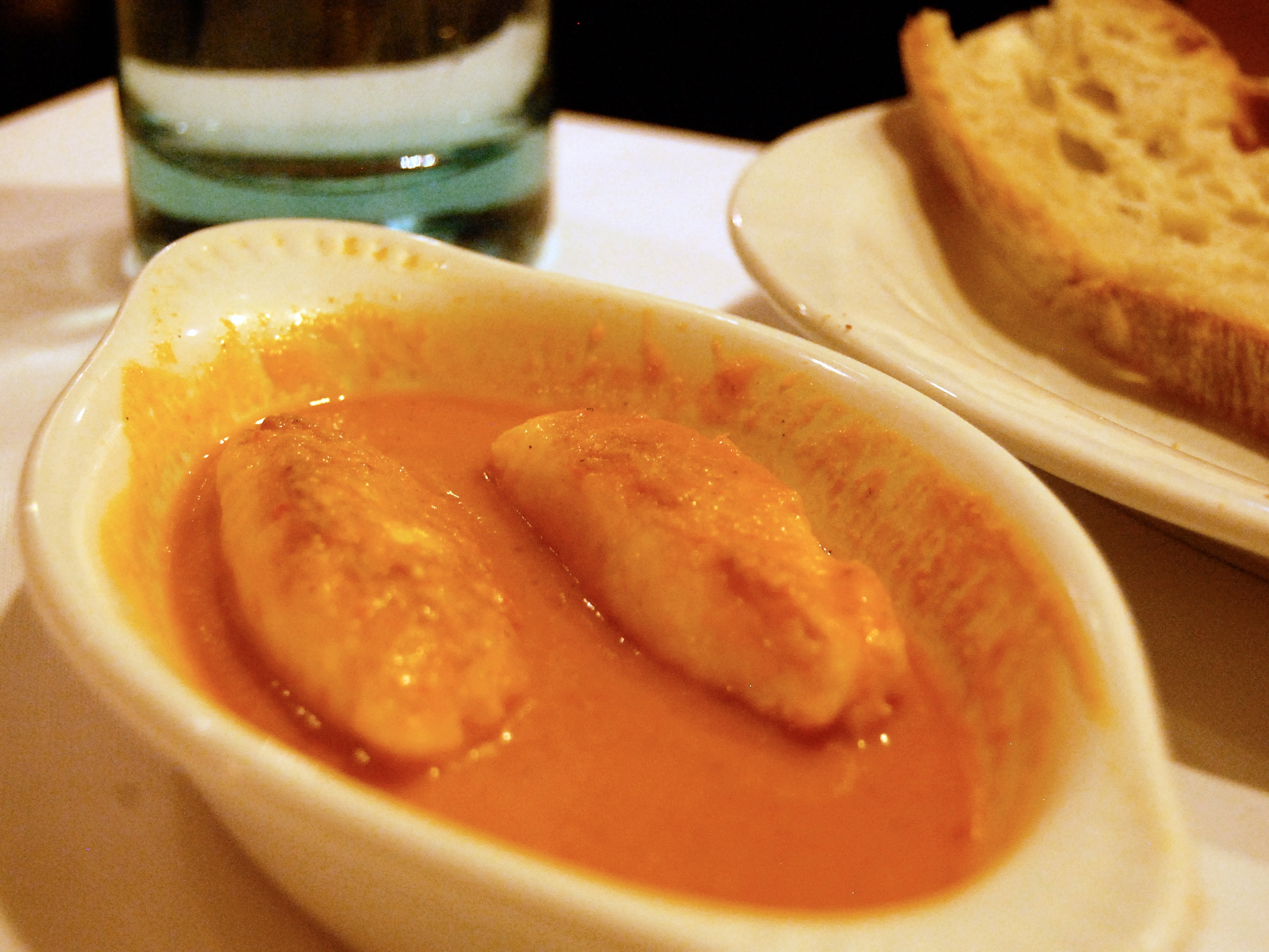 pike quenelles